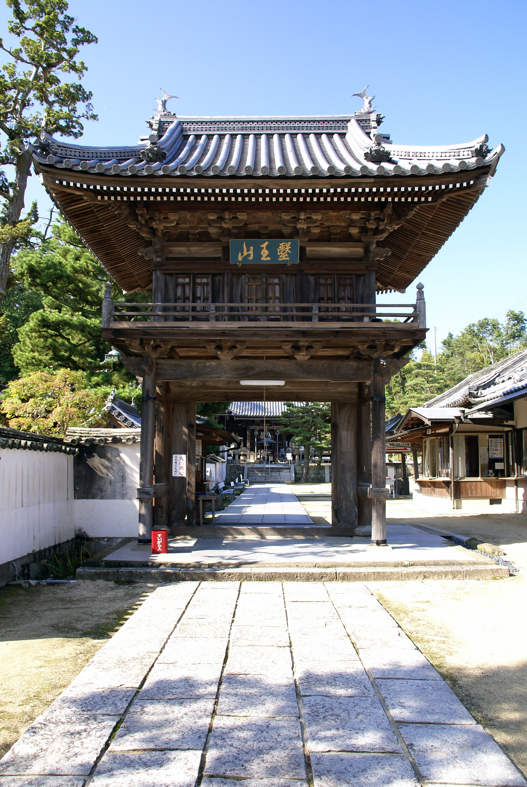 Yodaji in Higashikagawa, Kagawa prefecture, Japan